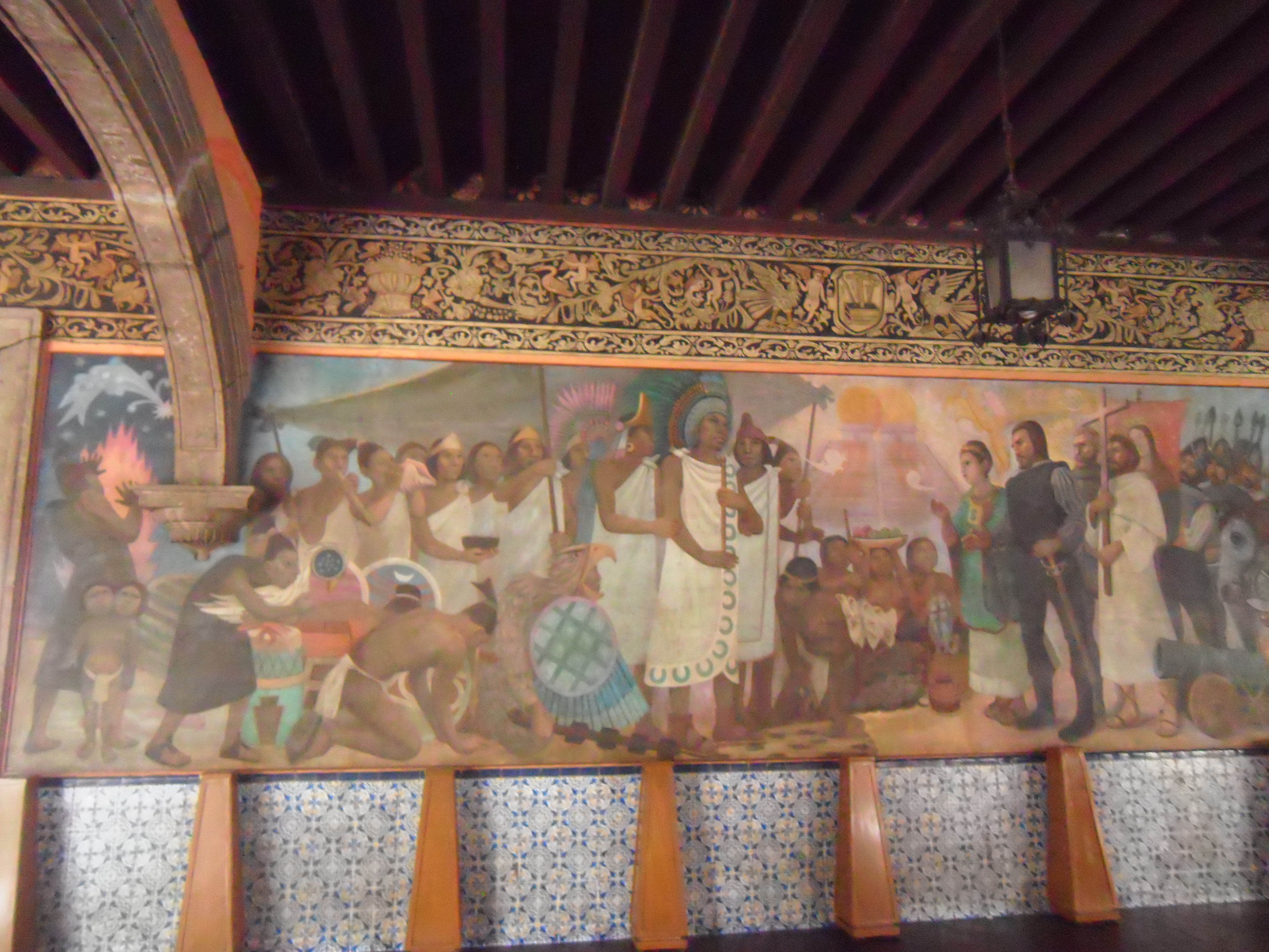 Mural del Hospital de Jesús